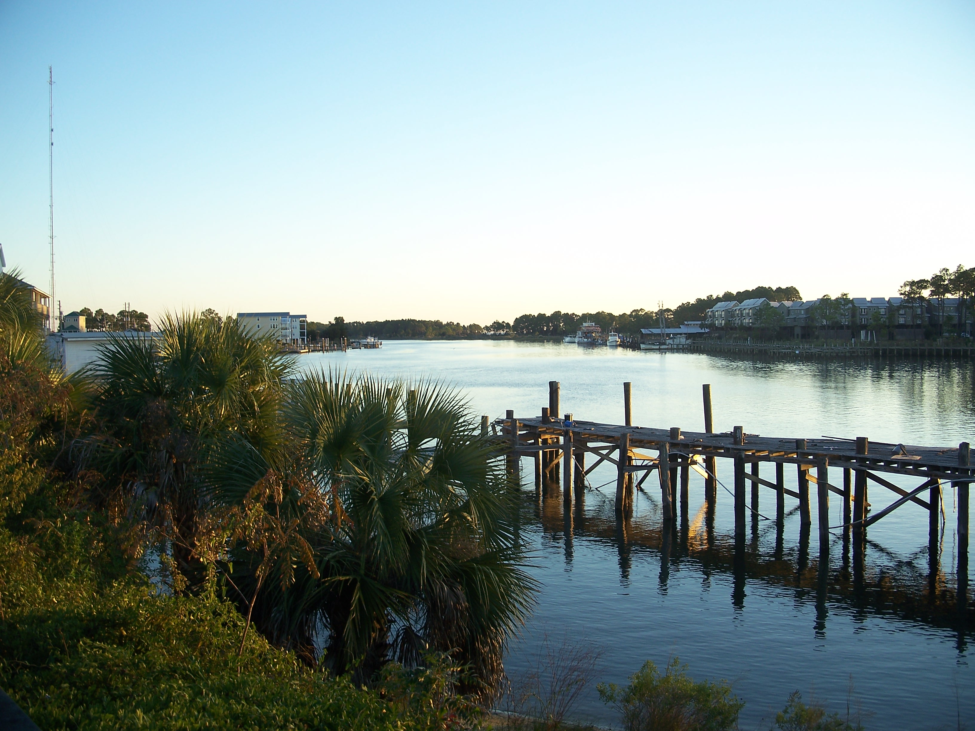 Carrabelle, Florida: Carrabelle River